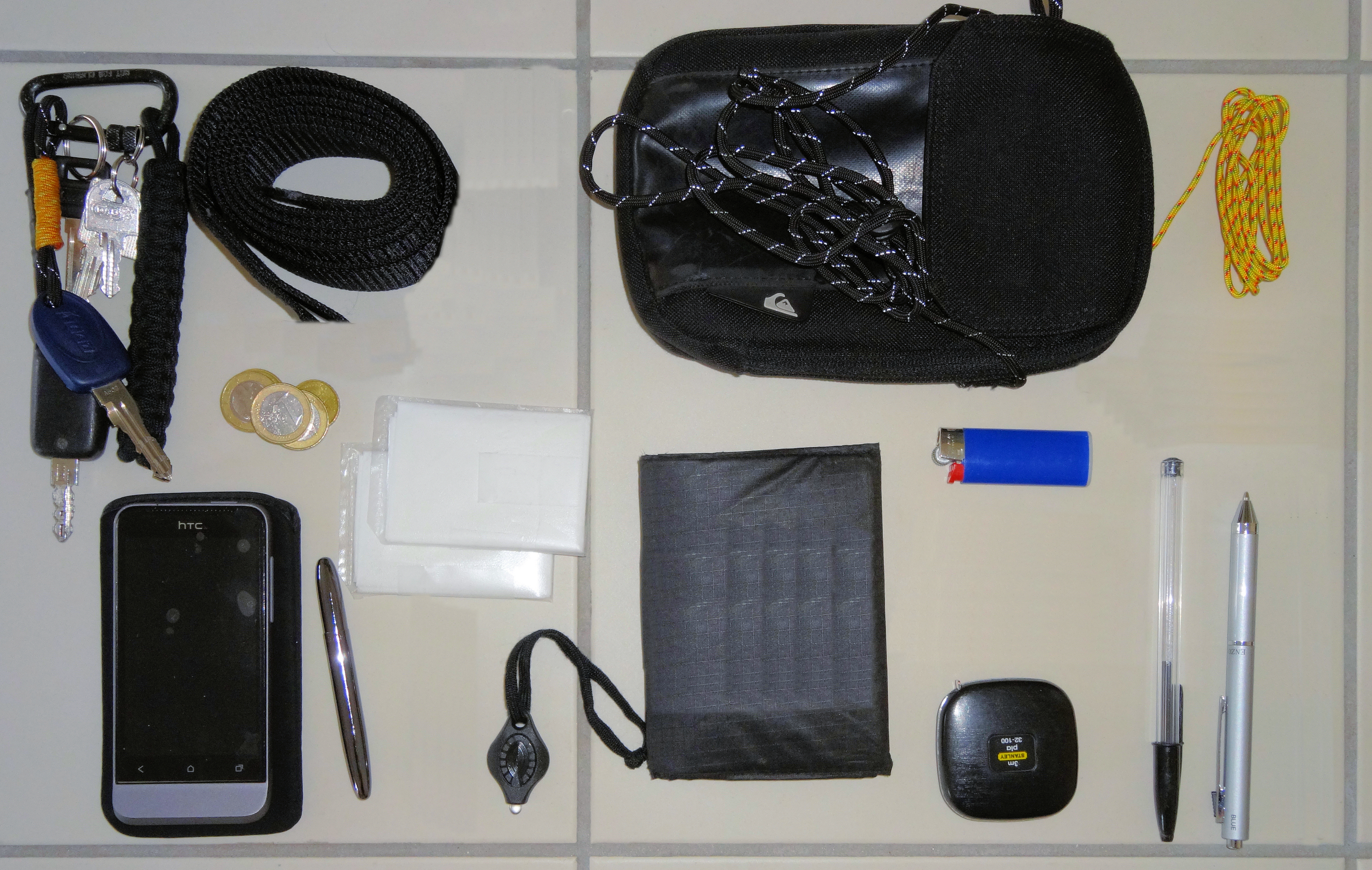 Exemple d'Every Day Carry